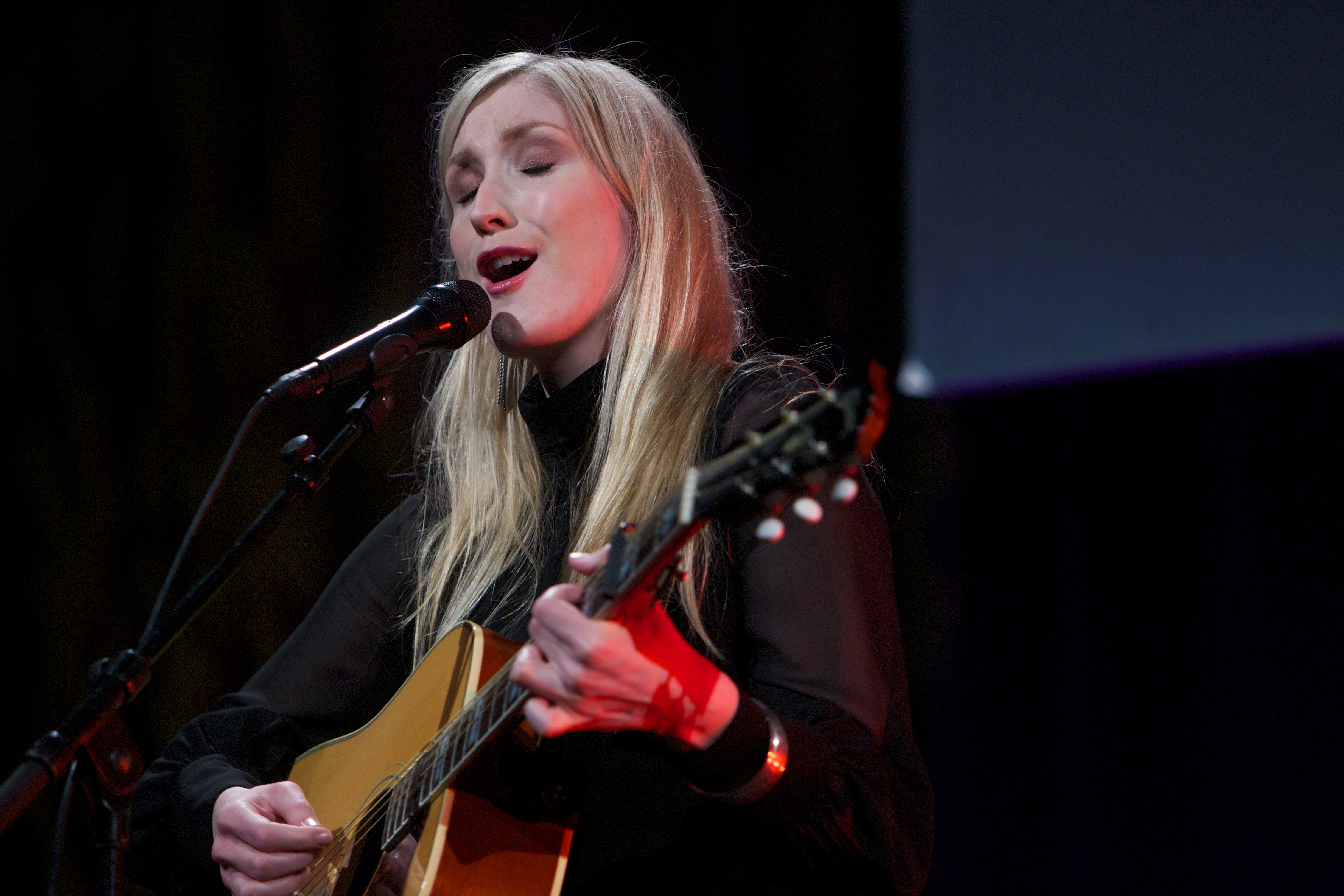 Christel Alsos. ZERO-konferansen arrangeres av den norske miljøstiftelsen Zero Emission Resource Organization (ZERO). Foto: Eirik Helland Urke